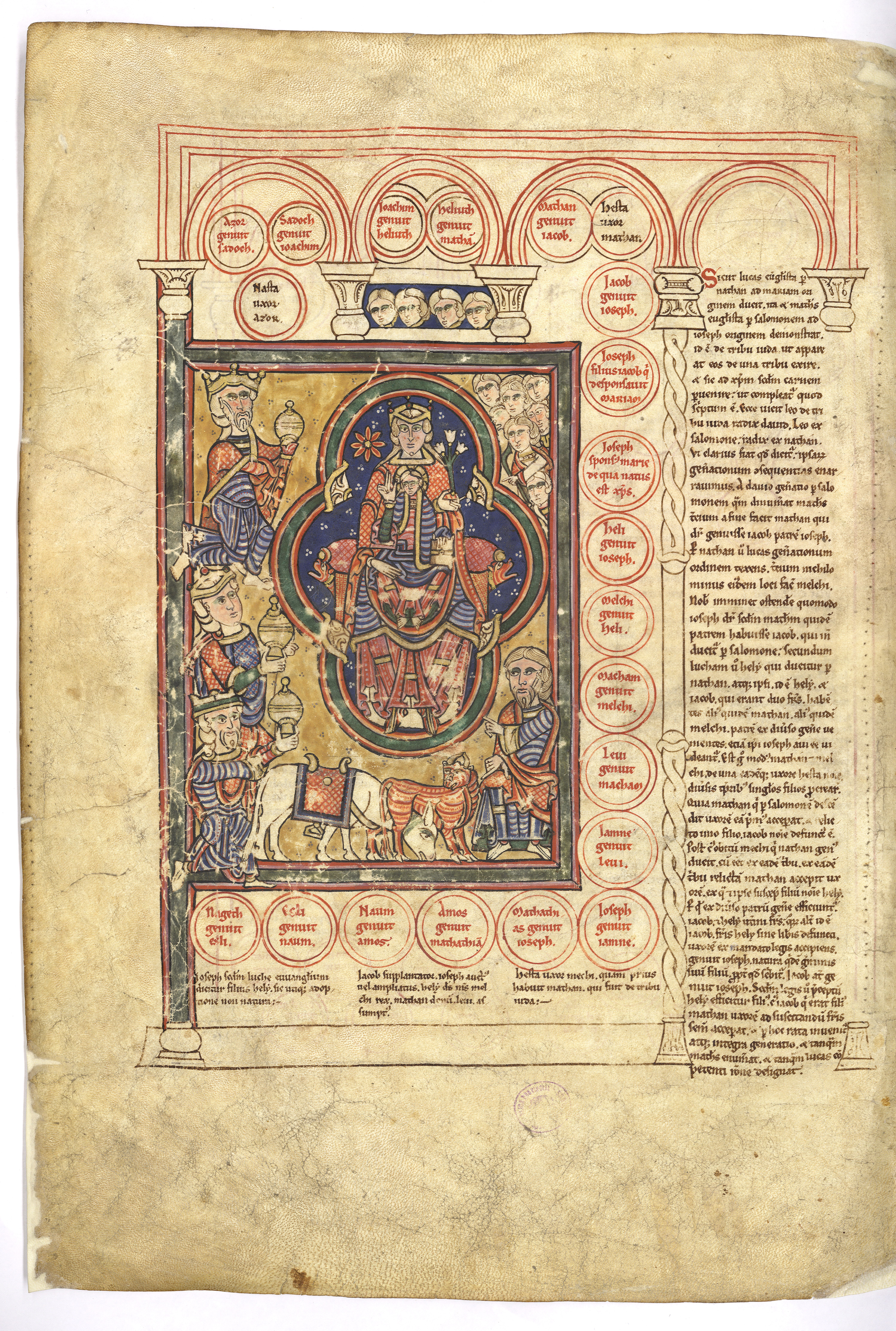 Miniatura de la Biblia Románica de Burgos, de finales del S. XII, que representa la Adoración de los Reyes Magos. Esta Biblia se conserva en la Biblioteca Pública del Estado en Burgos, España